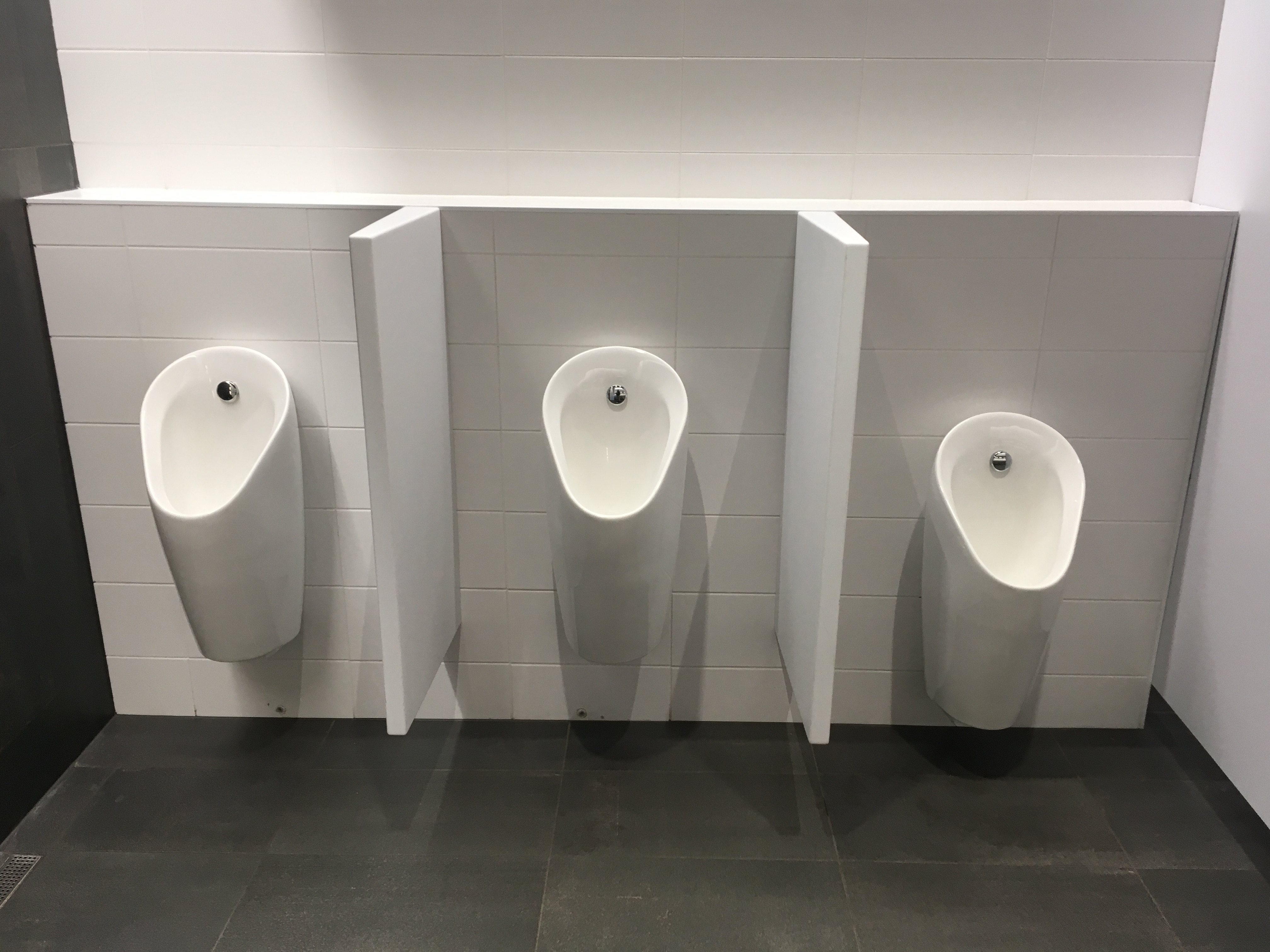 Helsinki in 2018